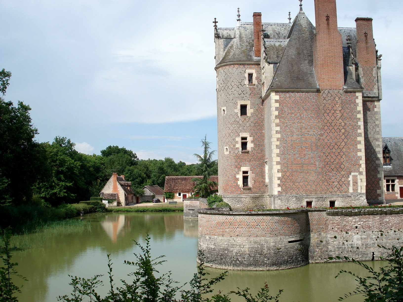 Château du Moulin, comm. de Lassay-sur-Croisne, Loir-et-Cher.